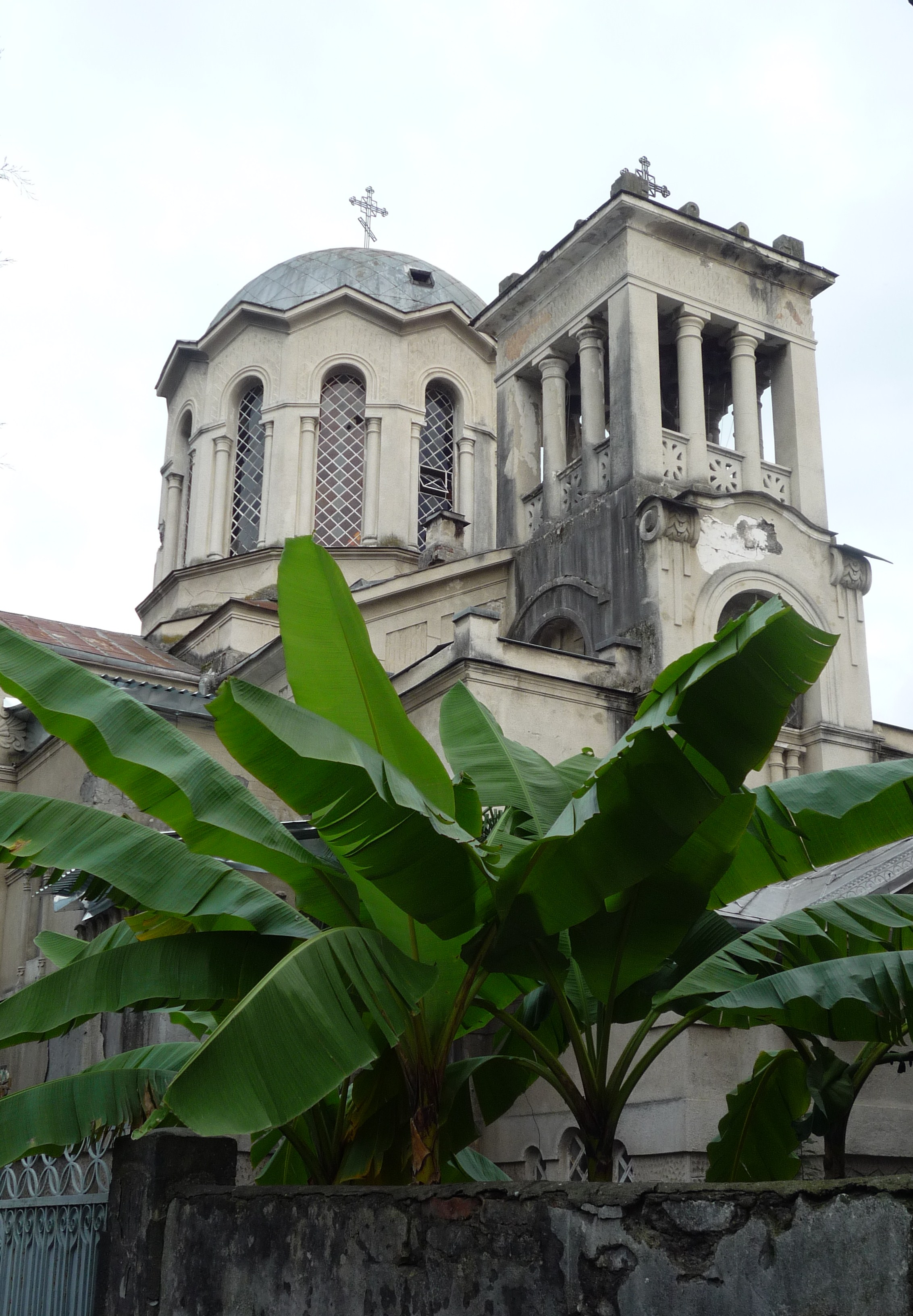 Благовещенский собор в Сухуме